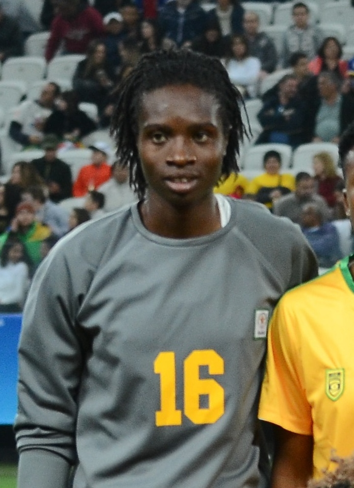 São Paulo - Seleções femininas do Zimbábue e da Alemanha se enfrentam na Arena Corinthians (Rovena Rosa/Agência Brasil)